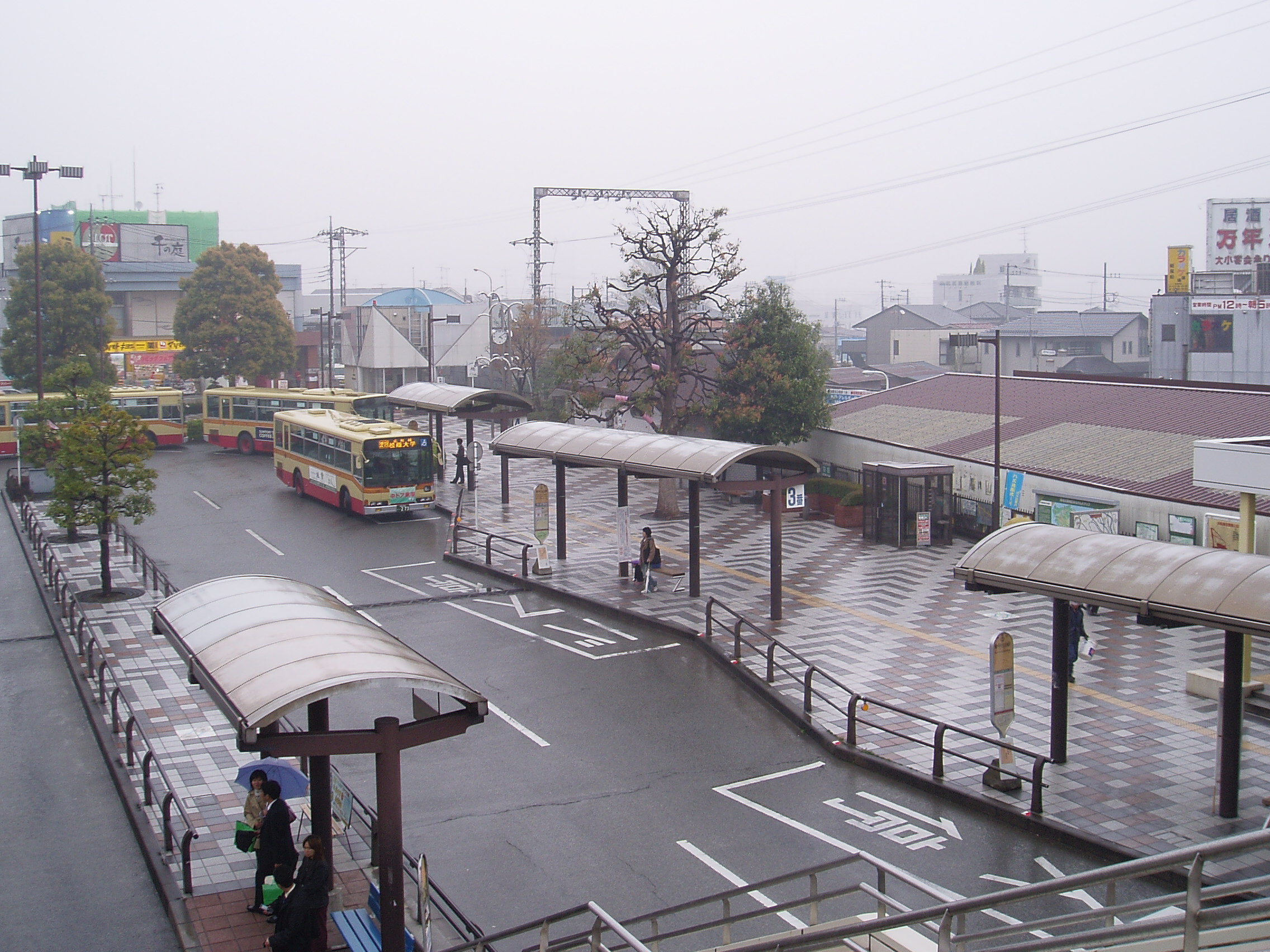 Aiko-Ishida Sta. Bus terminal